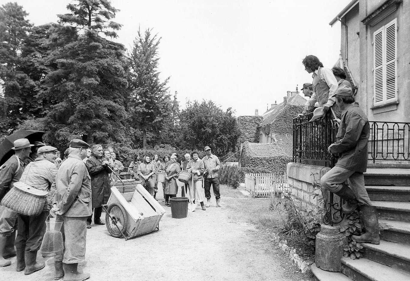 La Bêtacorne, courts-métrages de fiction (France 3 Bourgogne-Franche-Comté) réalisés en 1979 par Jean-Claude Morin à Foucherans (Jura) d'après un fait-divers réel : l'invasion du village par des centaines de milliers d'escargots. Ici, les habitants se préparent à partir en chasse des escargots, envahisseurs mais néanmoins comestibles!